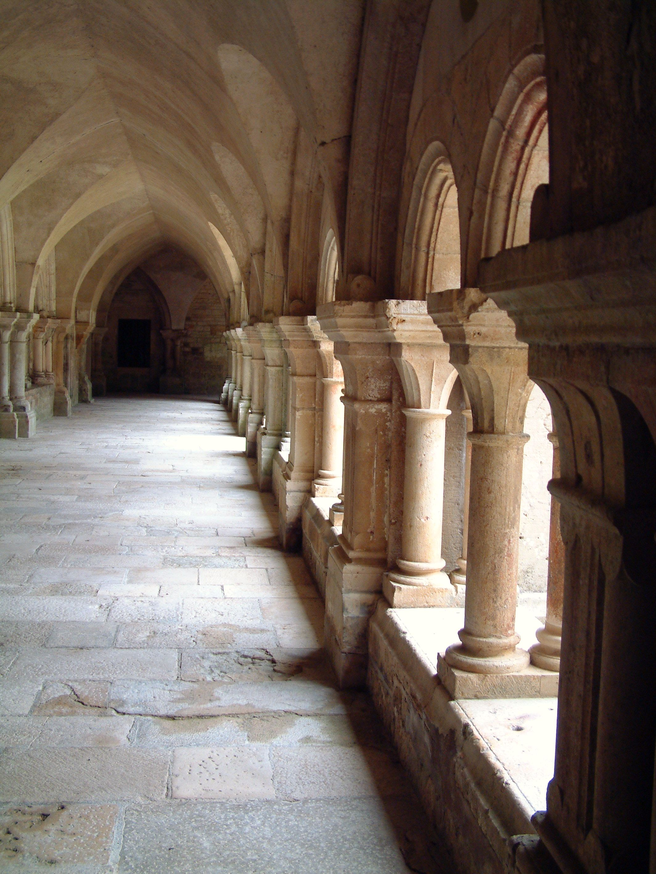 Abadia de Fontenay - Galeria del claustre